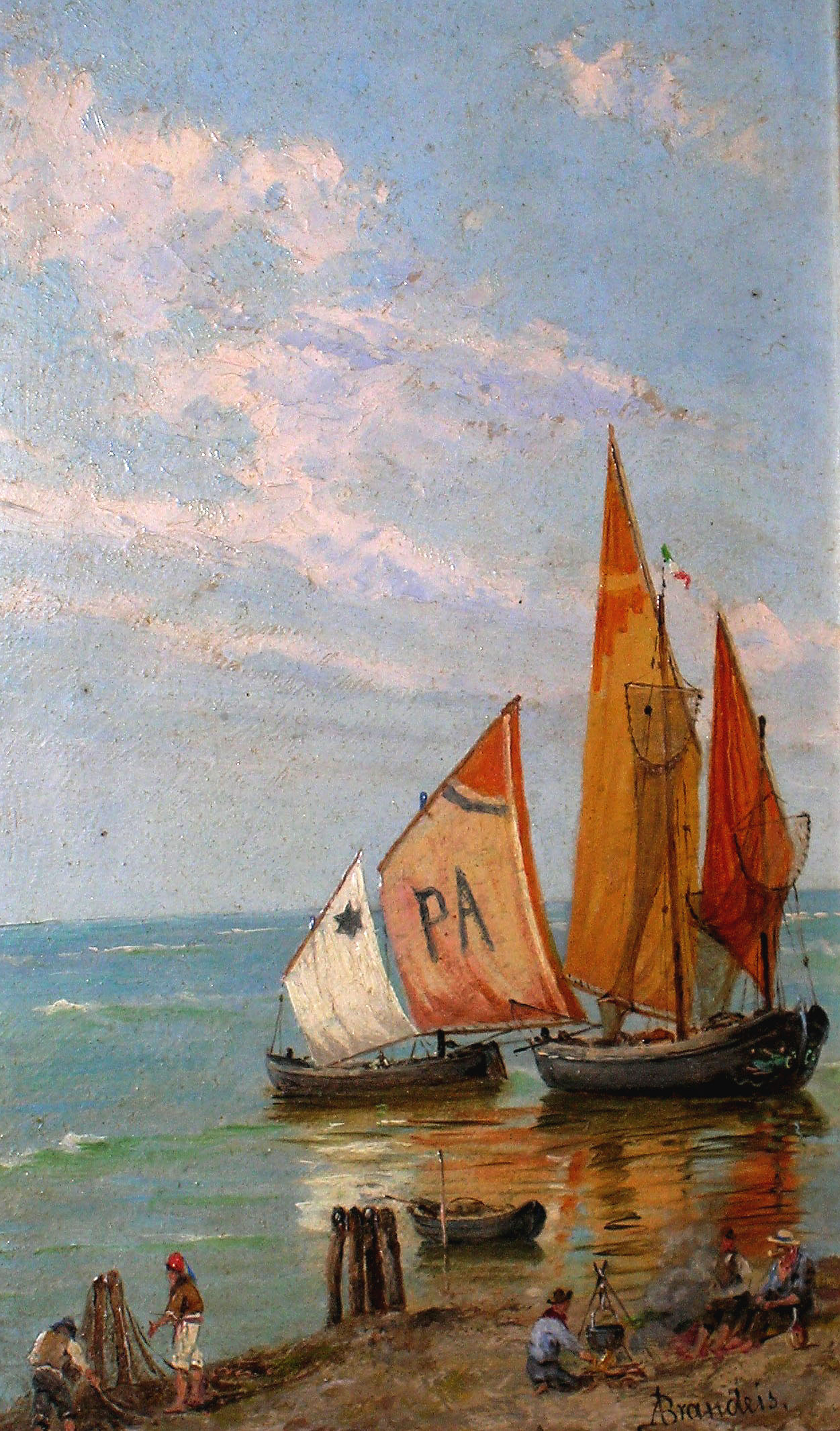 Luxembourgish: Seegelschëffer